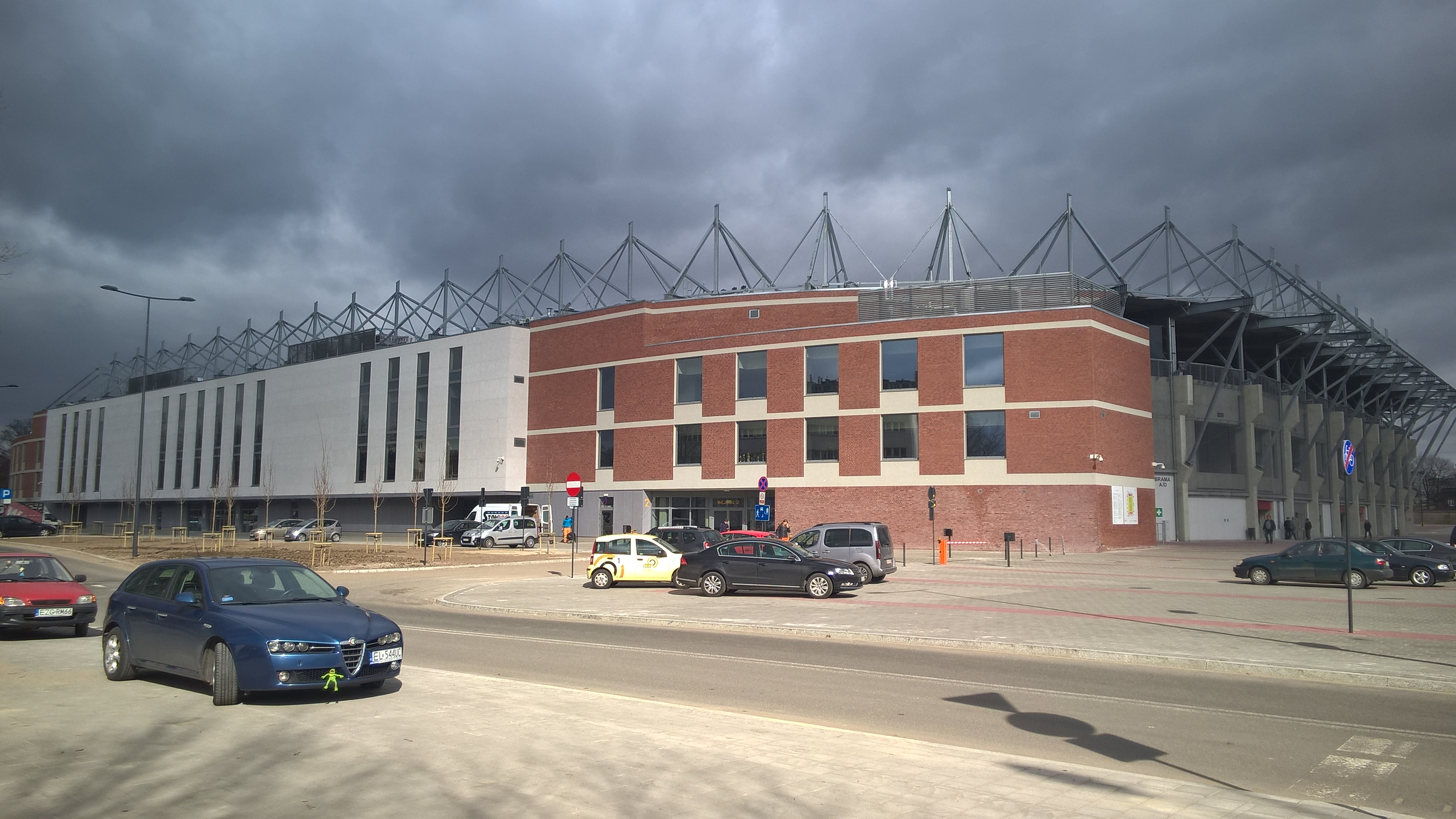 Nowy stadion Widzewa - trybuna A (marzec 2017)